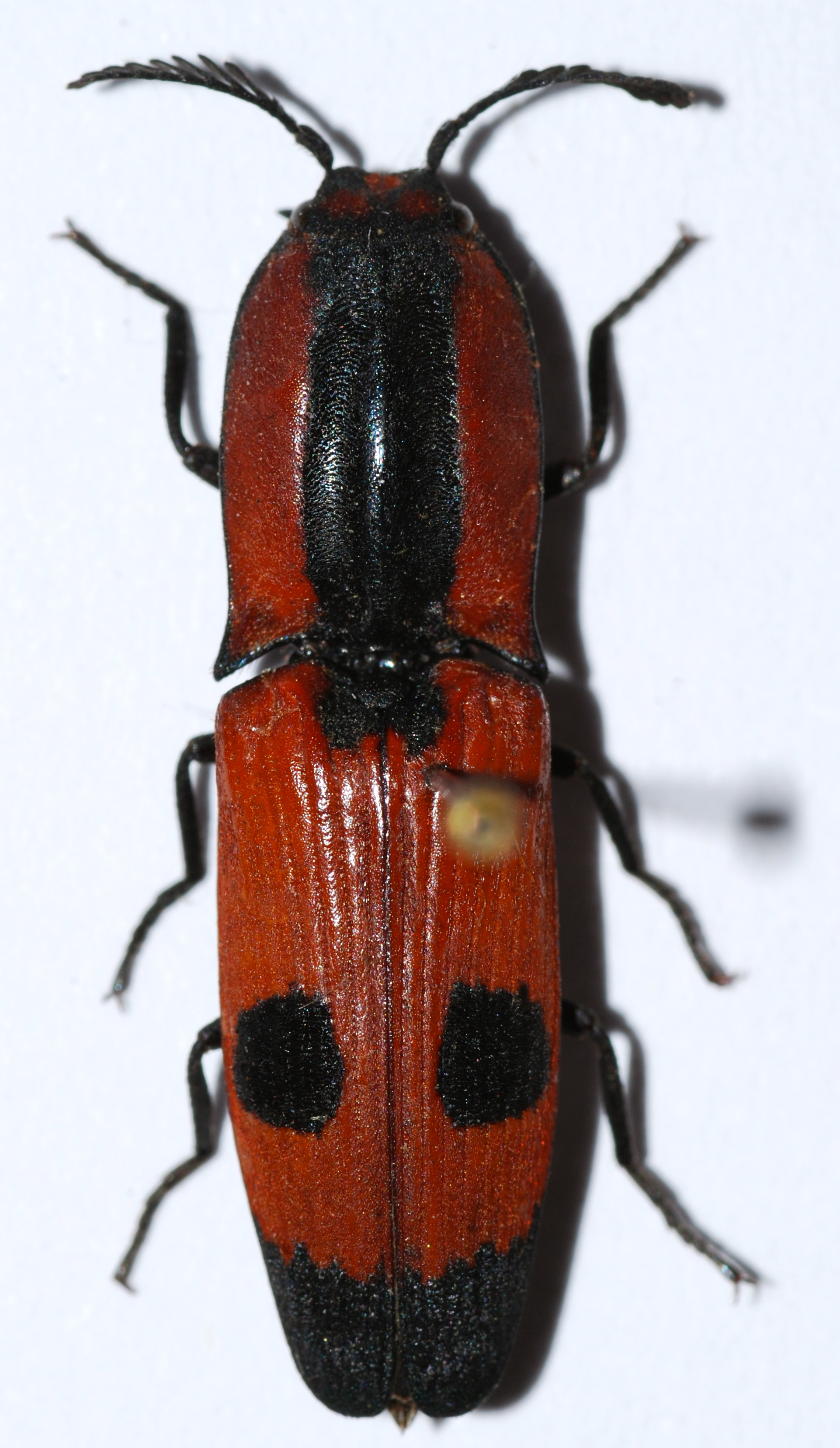 Beparasy, MADAGASCAR